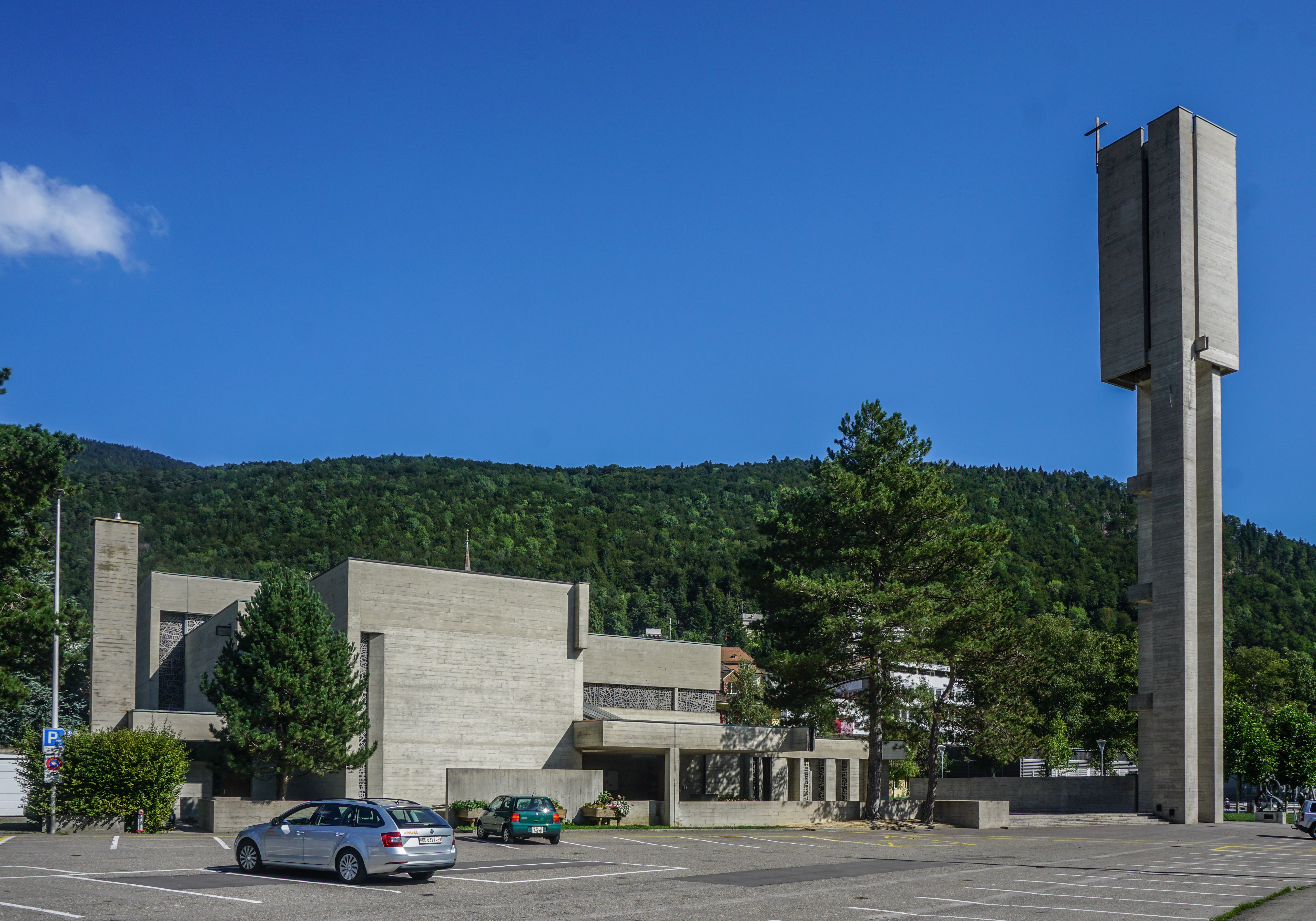 Notre-Dame de la Prévôté Südseite mit Turm